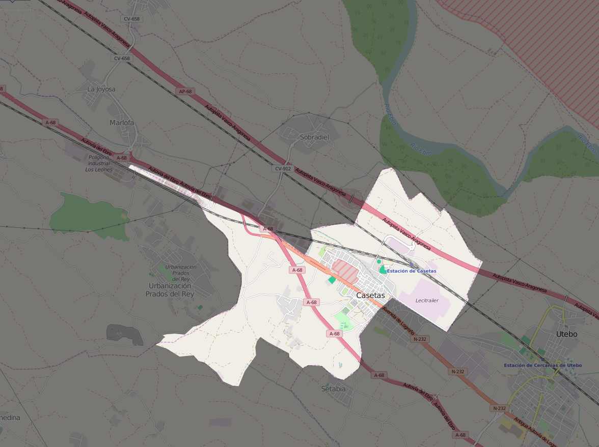 Mapa del distrito de Casetas en Zaragoza.